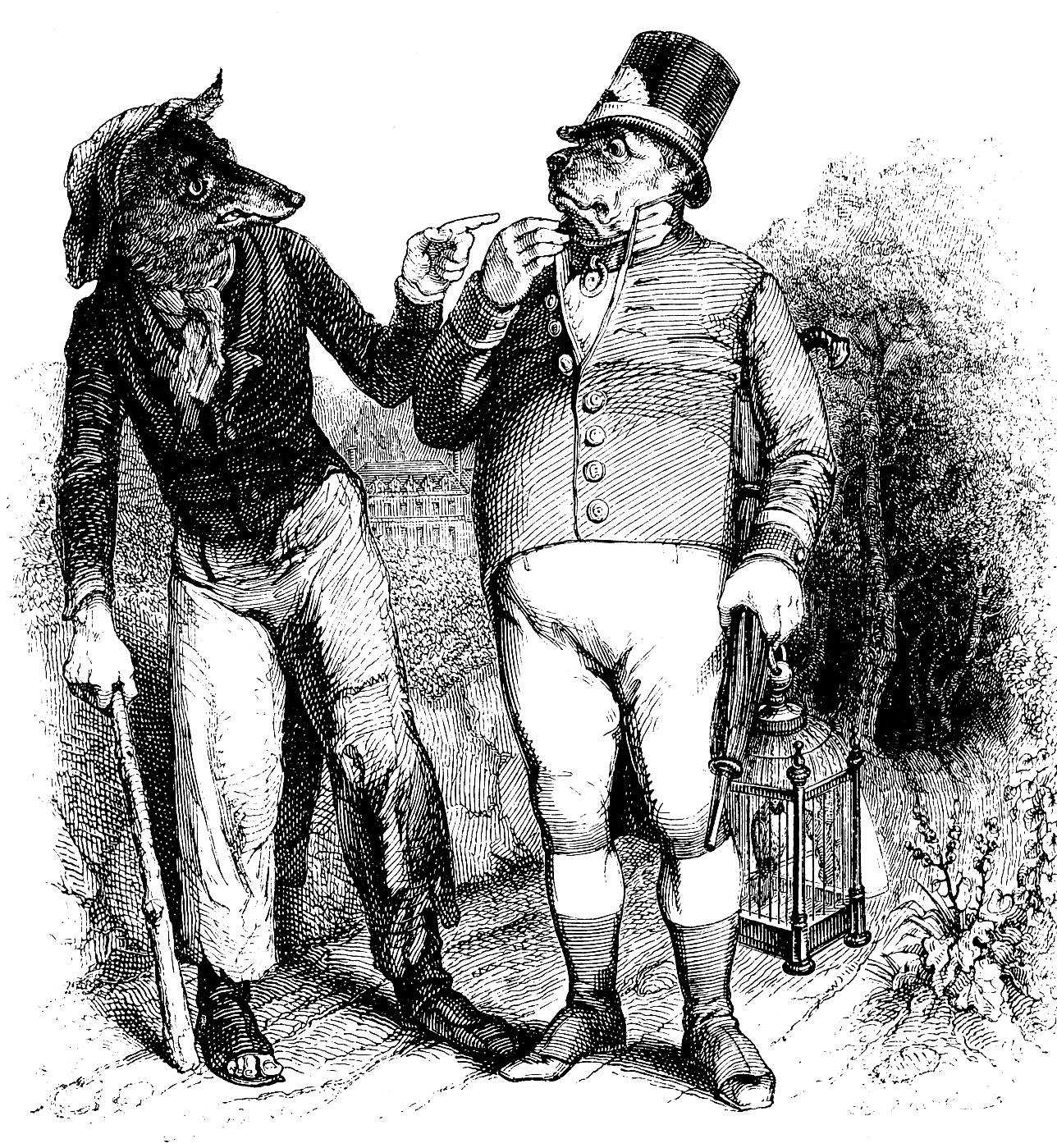 Grandville, illustrateur français. Illustration pour "Le loup et le chien" de Jean de La Fontaine.